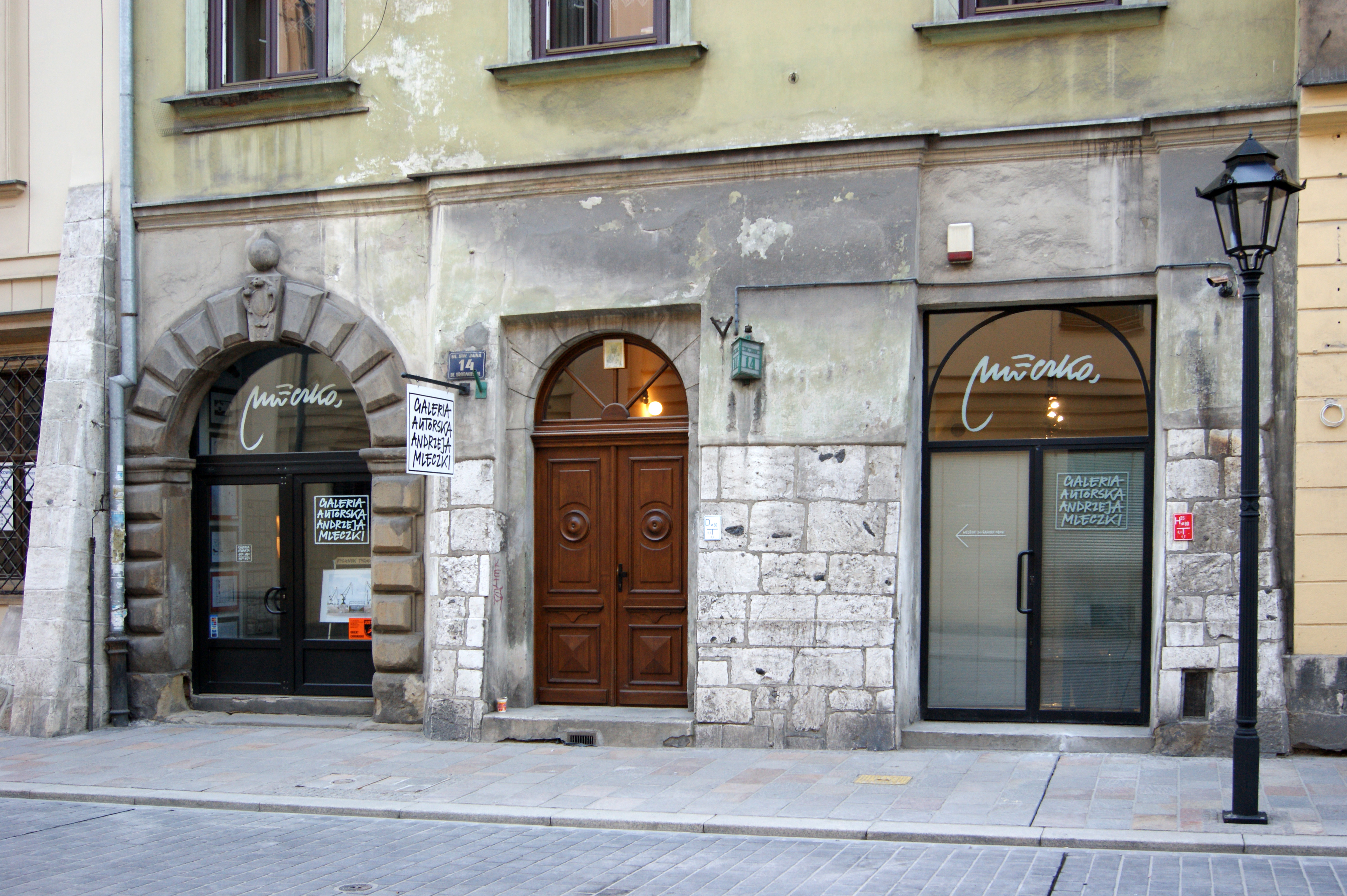 Galeria Autorska Andrzeja Mleczki w Krakowie, przy ul. św. Jana 14.